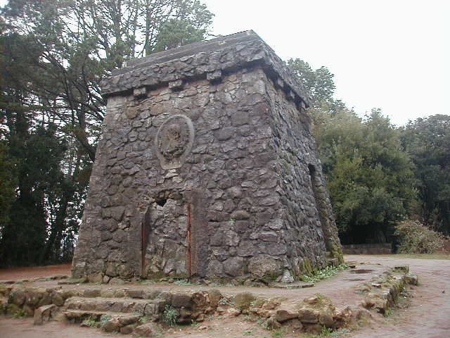 Conocida como "El Mirador Alemán" Fue levantado por la colonia Alemana en homenaje al canciller alemán Bismark. Tenía dos niveles: el primero, cerrado por una puerta de hierro y el segundo, que presentaba una vista panorámica de gran belleza hacia la ciudad. Con la imagen de un sólido y maciso torreón en piedra, el Mirador Alemán se constituye en uno de los hitos históricos más relevantes por su emplazamiento y antigüedad. Actualmente la foresta ha cubierto sus vistas predominantes sobre Concepción, restándole su función de mirador, pero manteniendo aún el carácter de hito urbano presente en la memoria colectiva de la gente, y configurando un reconocido hito referencial en los paseos del cerro Caracol.